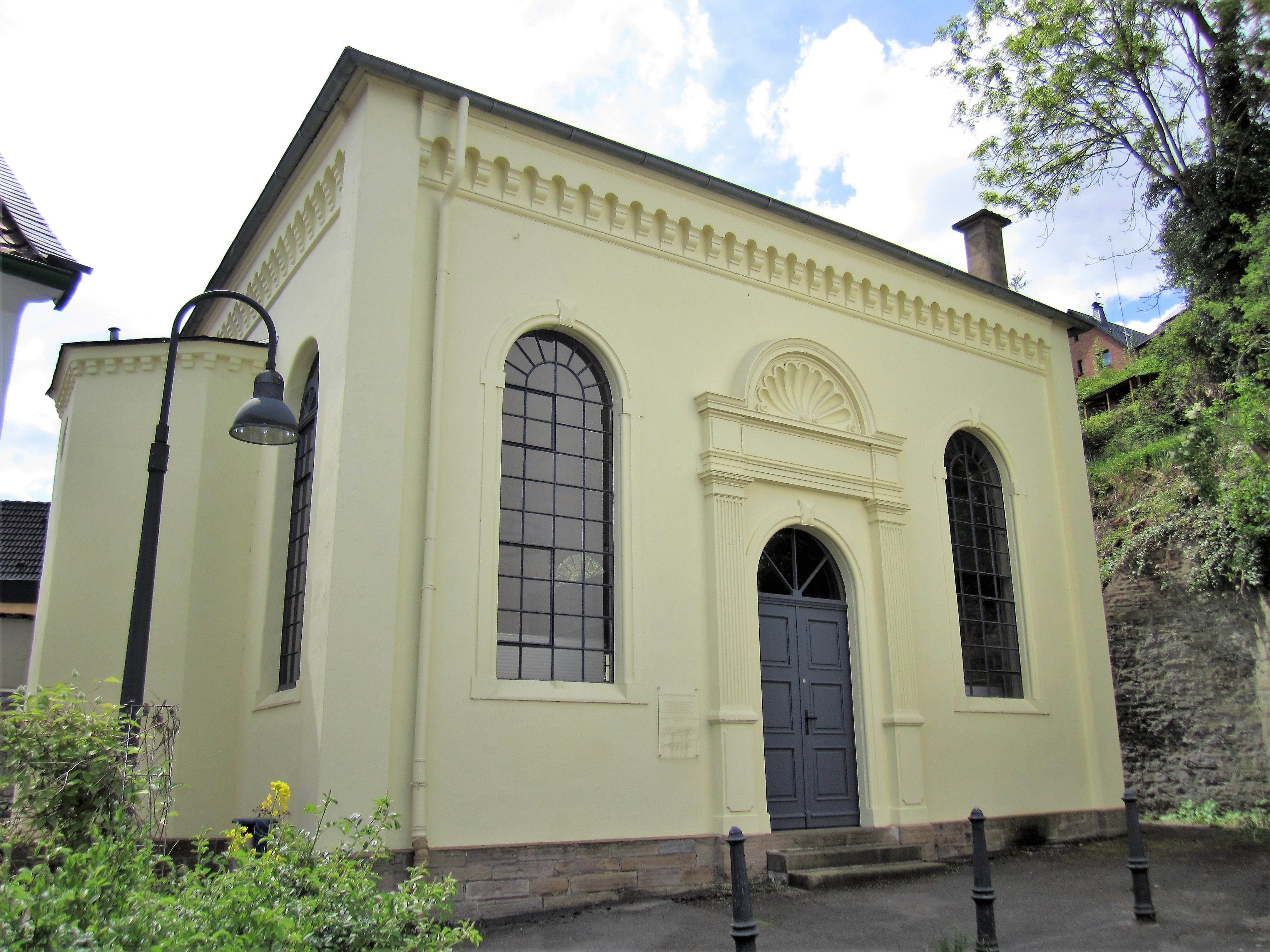 Denkmalgeschützte Alte Synagoge in Hagen-Hohenlimburg, Jahnstraße 46. Im Jahre 1870 vom Oestricher Baumeister Liesenhoff errichtet (Kubischer Baukörper, quadratischer Grundriss). Am 10.11.1938 wurde sie von Nazi-Sympathisanten demoliert und teilweise zerstört. Die Gemeinde war gezwungen die Synagoge zu verkaufen. Danach war sie bis 1975 Fabrikationshalle. Nach dem Verfall des Gebäudes, konnte es durch eine 1980 gegründete Bürgeraktion gerettet werden. Heute ist das 1986 restaurierte Gebäude (Architekt: Gerd Pickenhan), Mahn- und Gedenkstätte der Stadt Hagen. Die Gedenkplatte in der Alten Synagoge trägt die Inschrift: „BAAL SCHEM TOW • IM GEDENKEN LIEGT DAS GEHEIMNIS DER ERLÖSUNG • ZUR ERINNERUNG AN DIE EHEMALIGE JÜDISCHE GEMEINDE HOHENLIMBURG“. This is a photograph of an architectural monument.